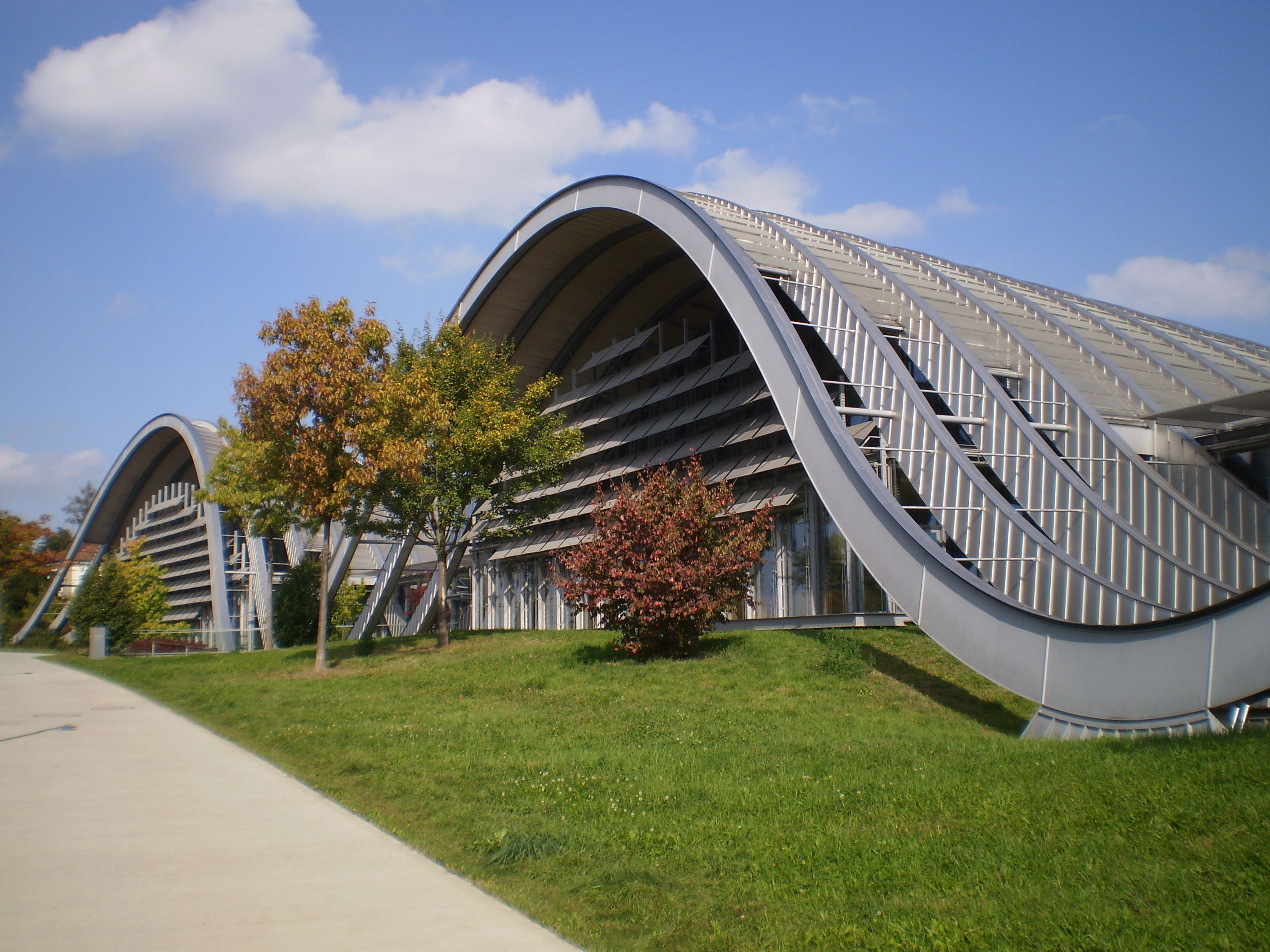 Zentrum Paul Klee